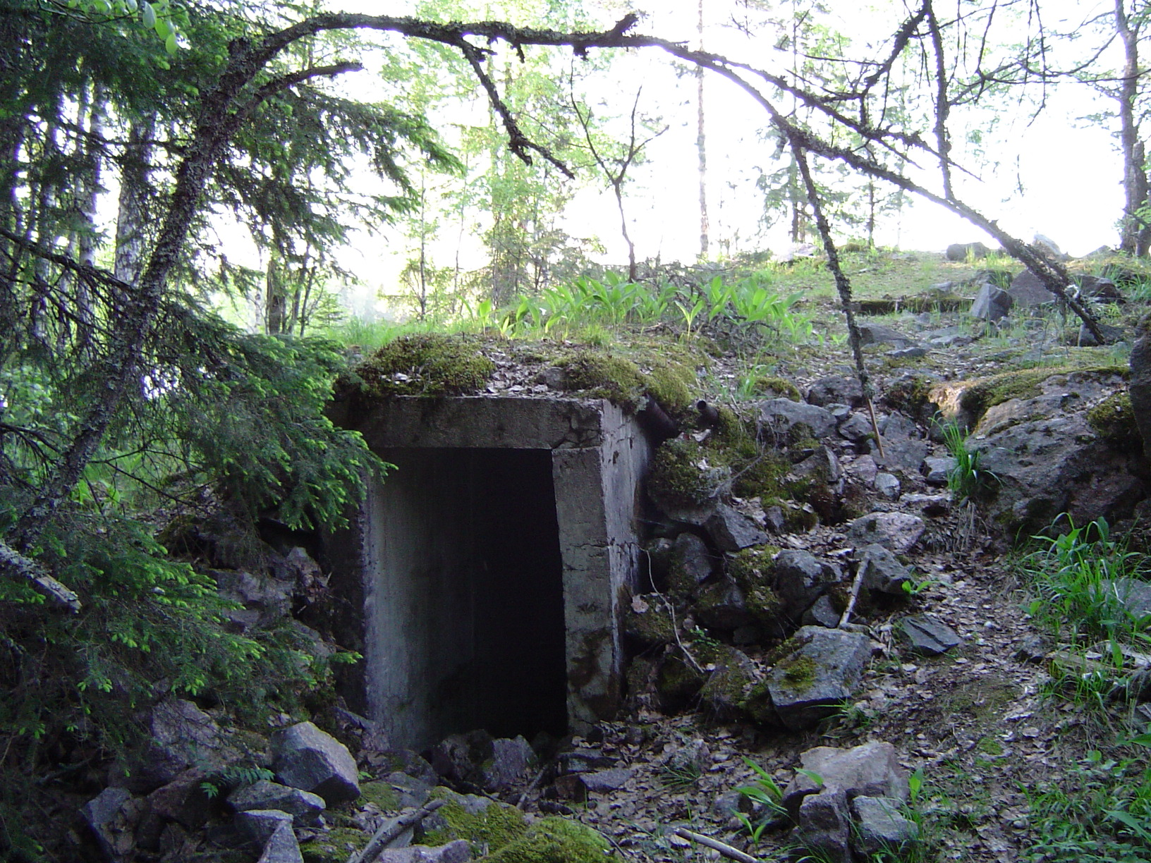 Soviet Bunker from 1944-56 in Kirkkonummi, Finland